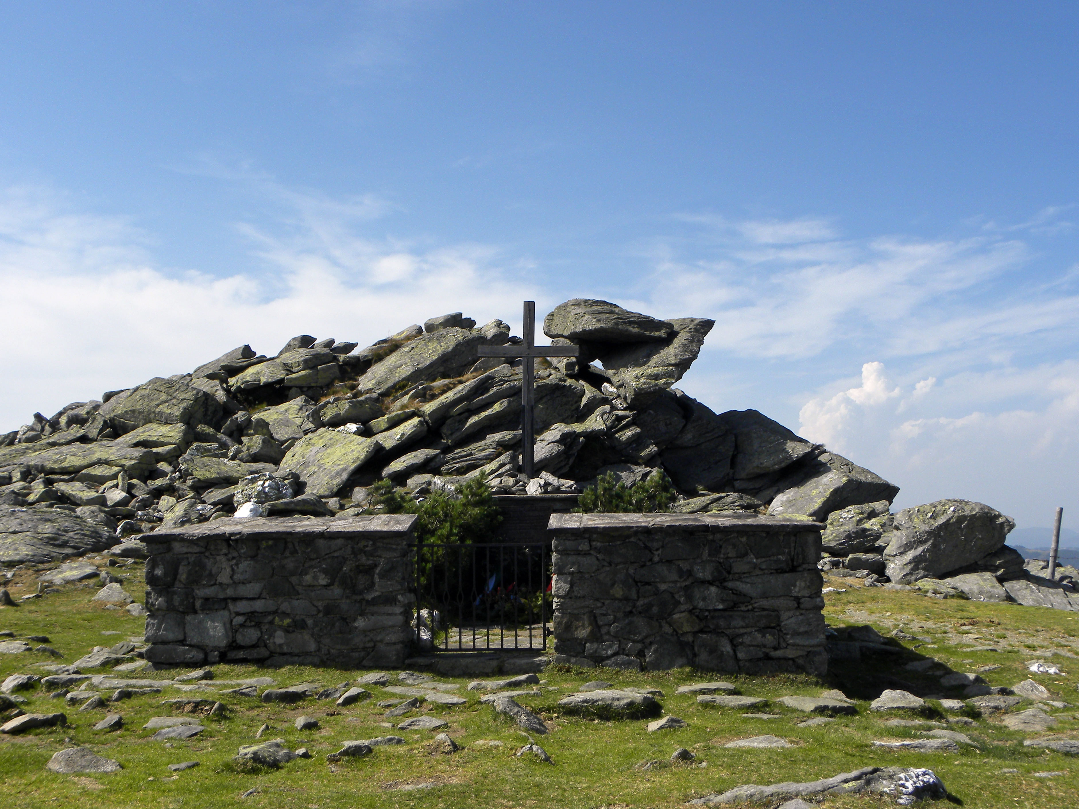 Wanderung von Mönichkirchen über den Hochwechsel nach Mariensee